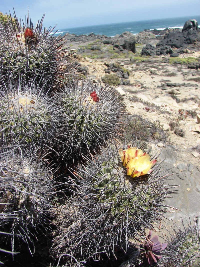 Caleta Toro, desembocadura del río Limarí